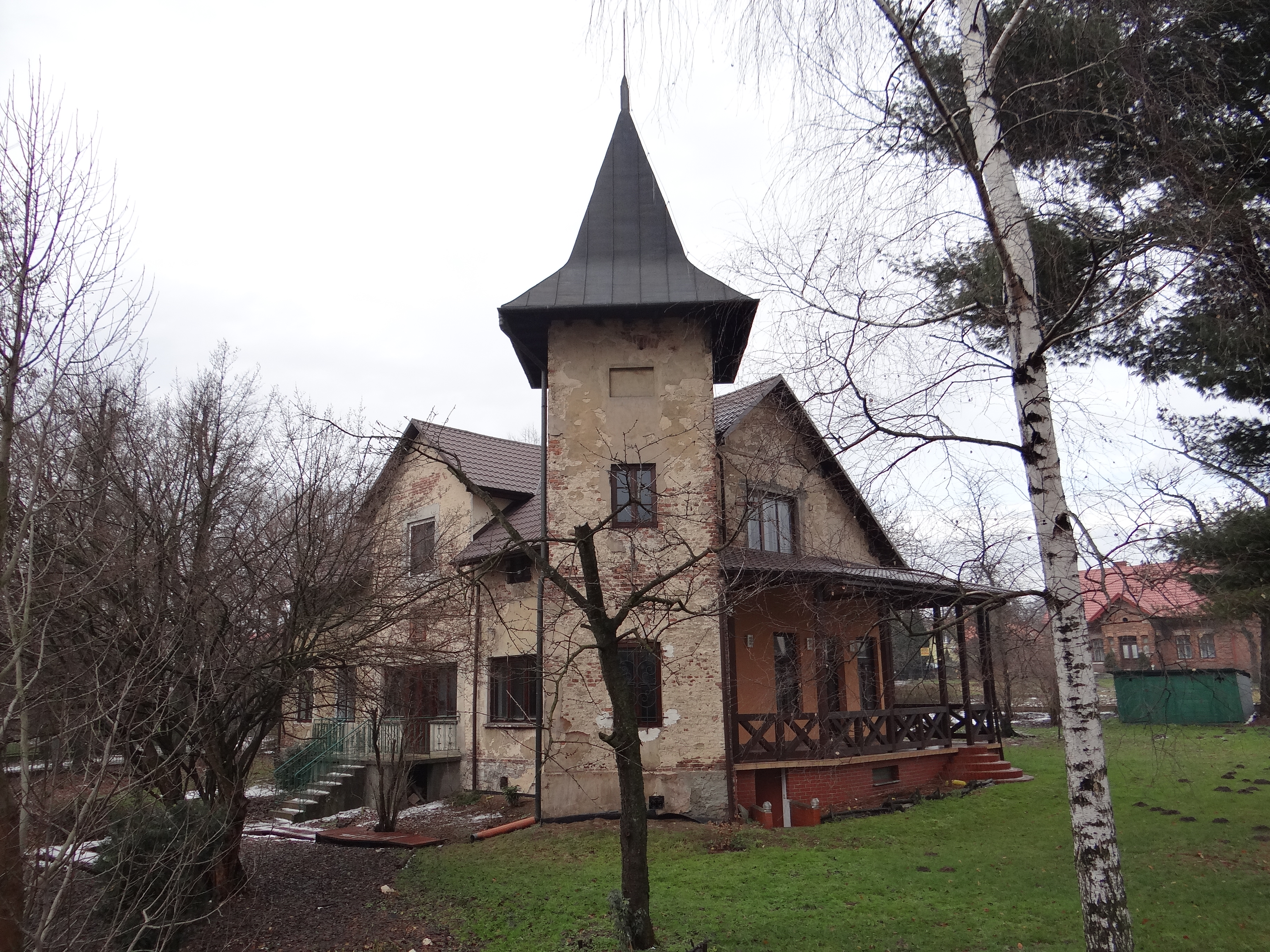 Rudawa, ul. A. Domańskiej 19 - dom z 1896